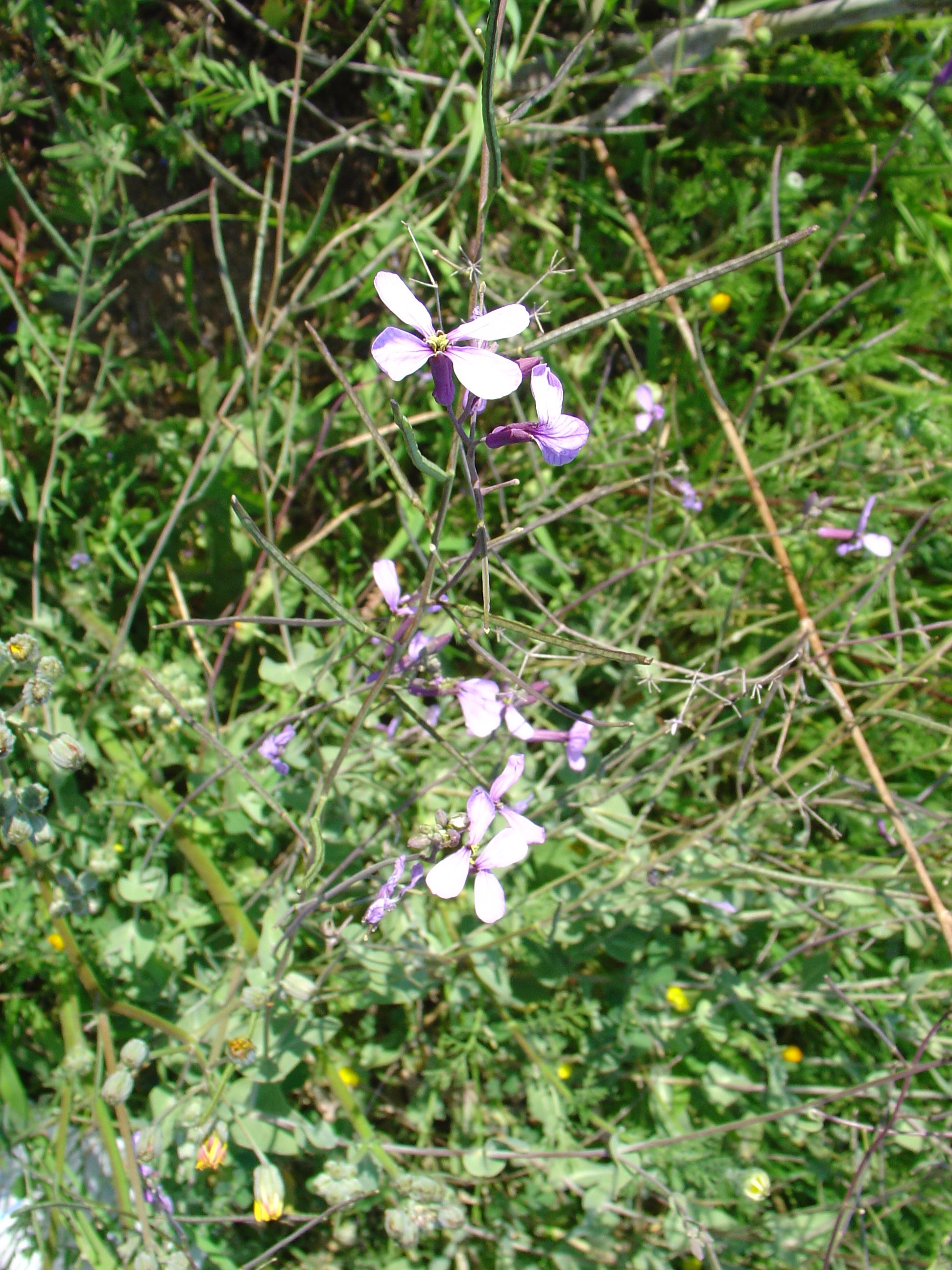 Moricandia arvensis procedente de margen de camino en Sierra Minera, Murcia, Spain